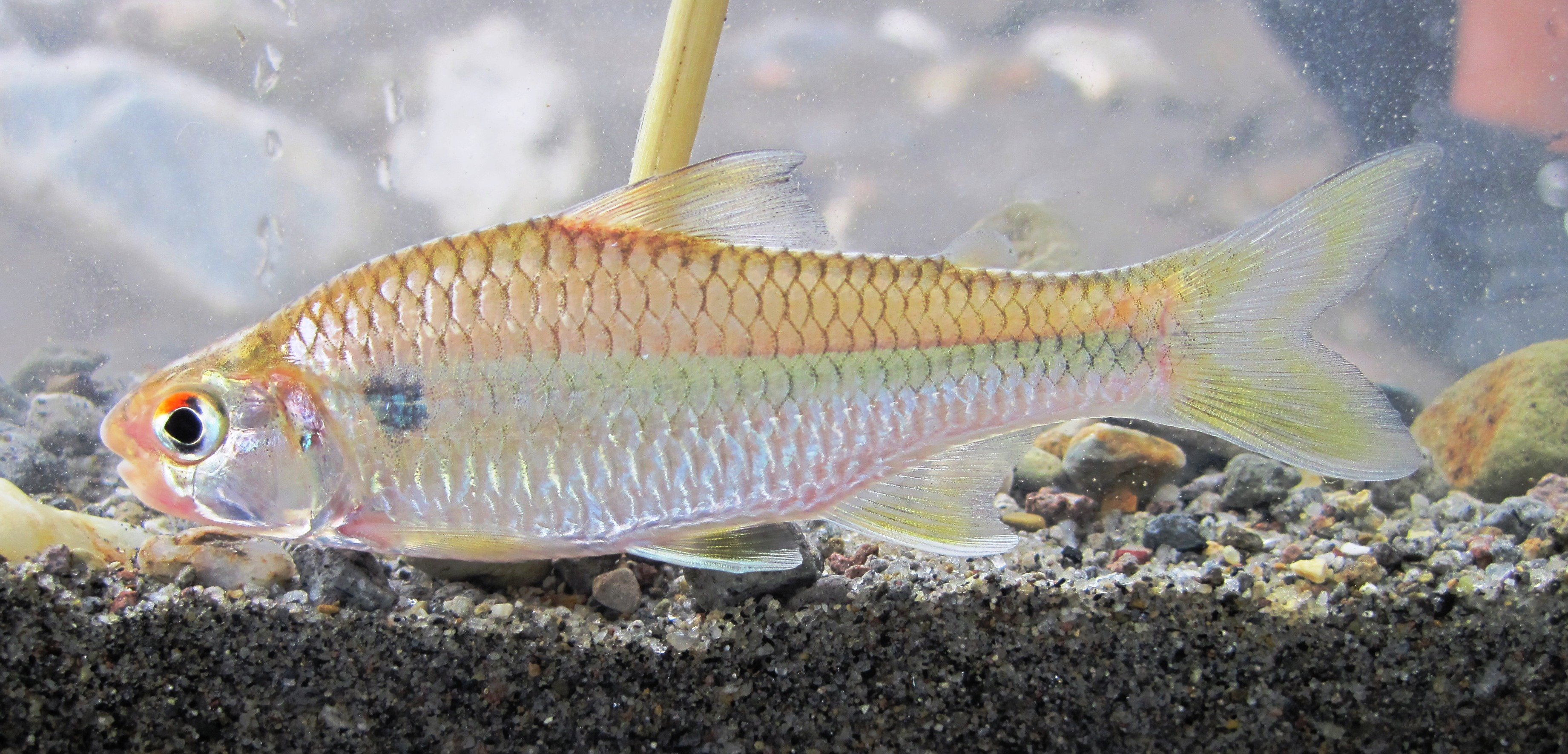 Creagrutus magdalenae